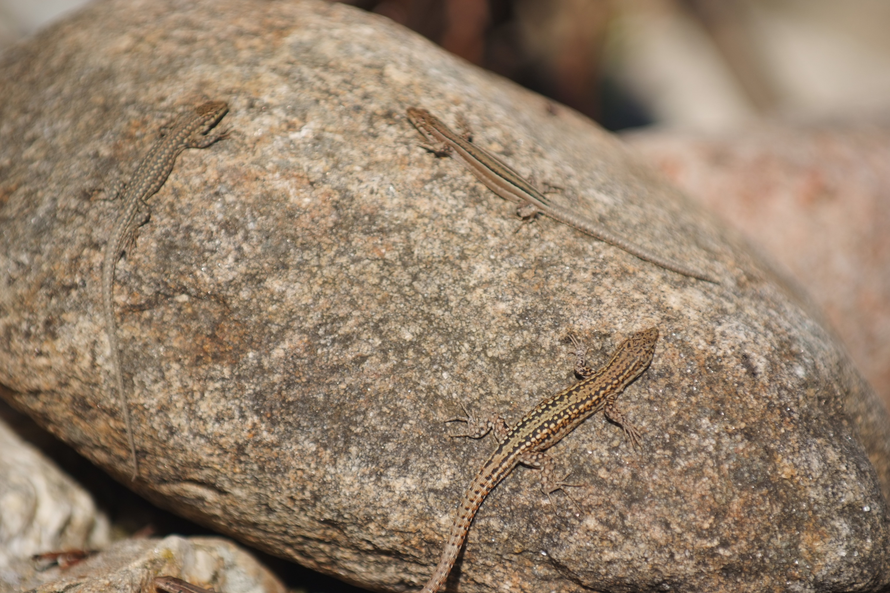 Baile de lagartijas (Villafranca de la Sierra; Ávila; España)